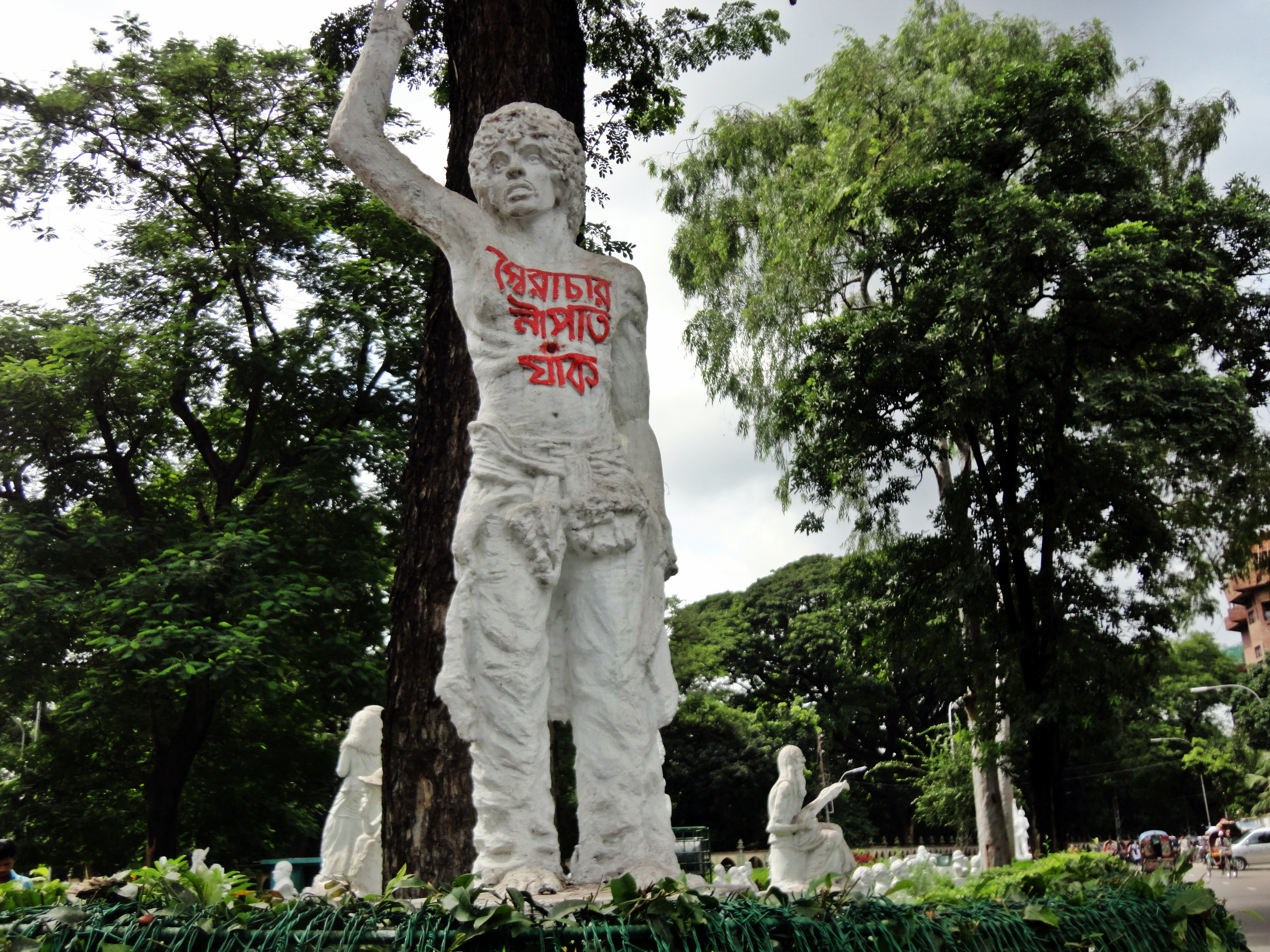 স্বৈরাচার বিরোধী আন্দলনের সময় নিহত ঢাকা বিশ্ববিদ্যালয়ের ছাত্র শহীদ নূর হোসেন এর স্মরনে ভাস্কর্য । যিনি বুকে পিঠে স্বৈরাচার নিপাত যাক, গণতন্ত্র মুক্তি পাক শ্লোগান লিখে মিছিল করার সময় পুলিশের গুলিতে নিহত হন ।